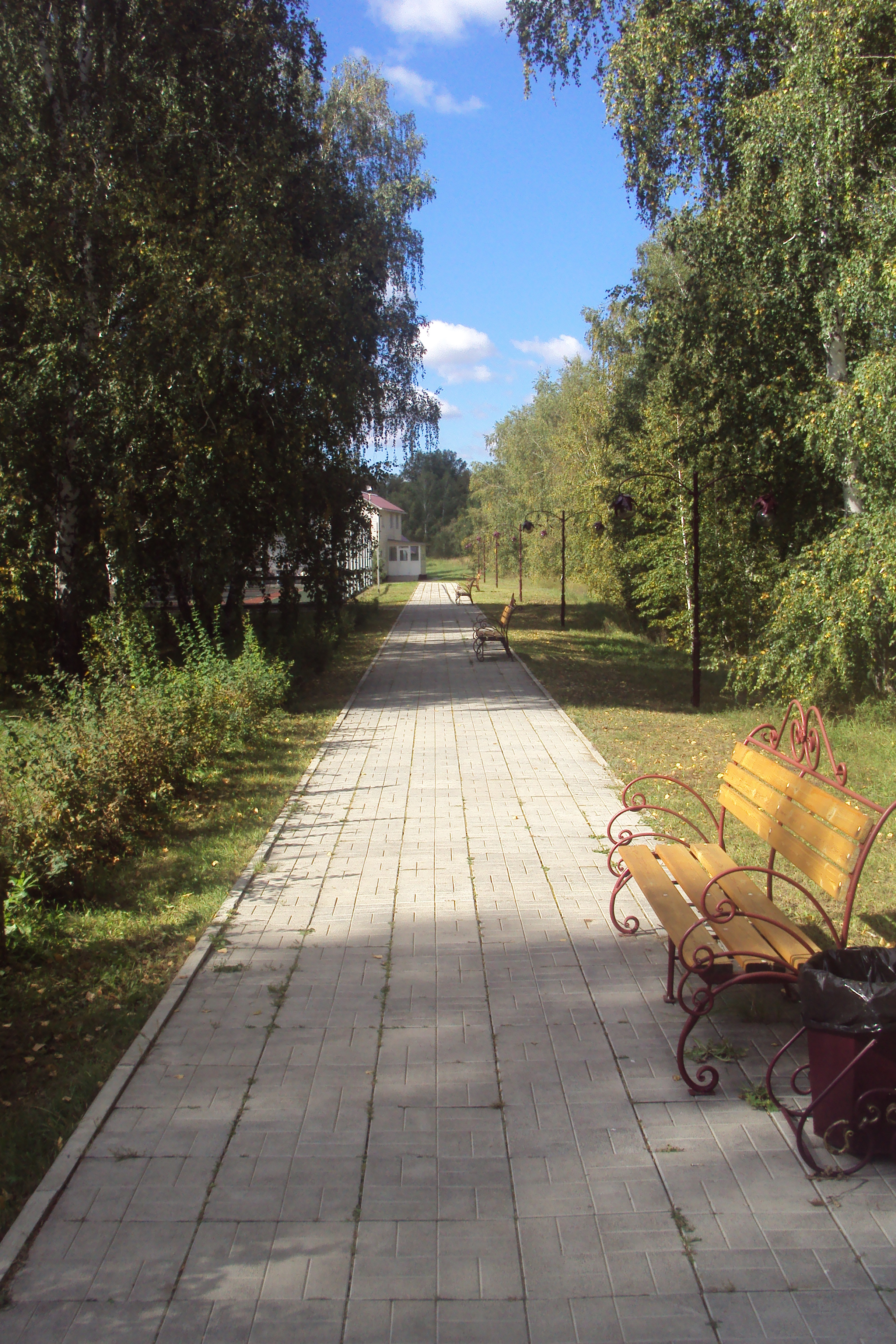 Верхняя дорожка вдоль Омки